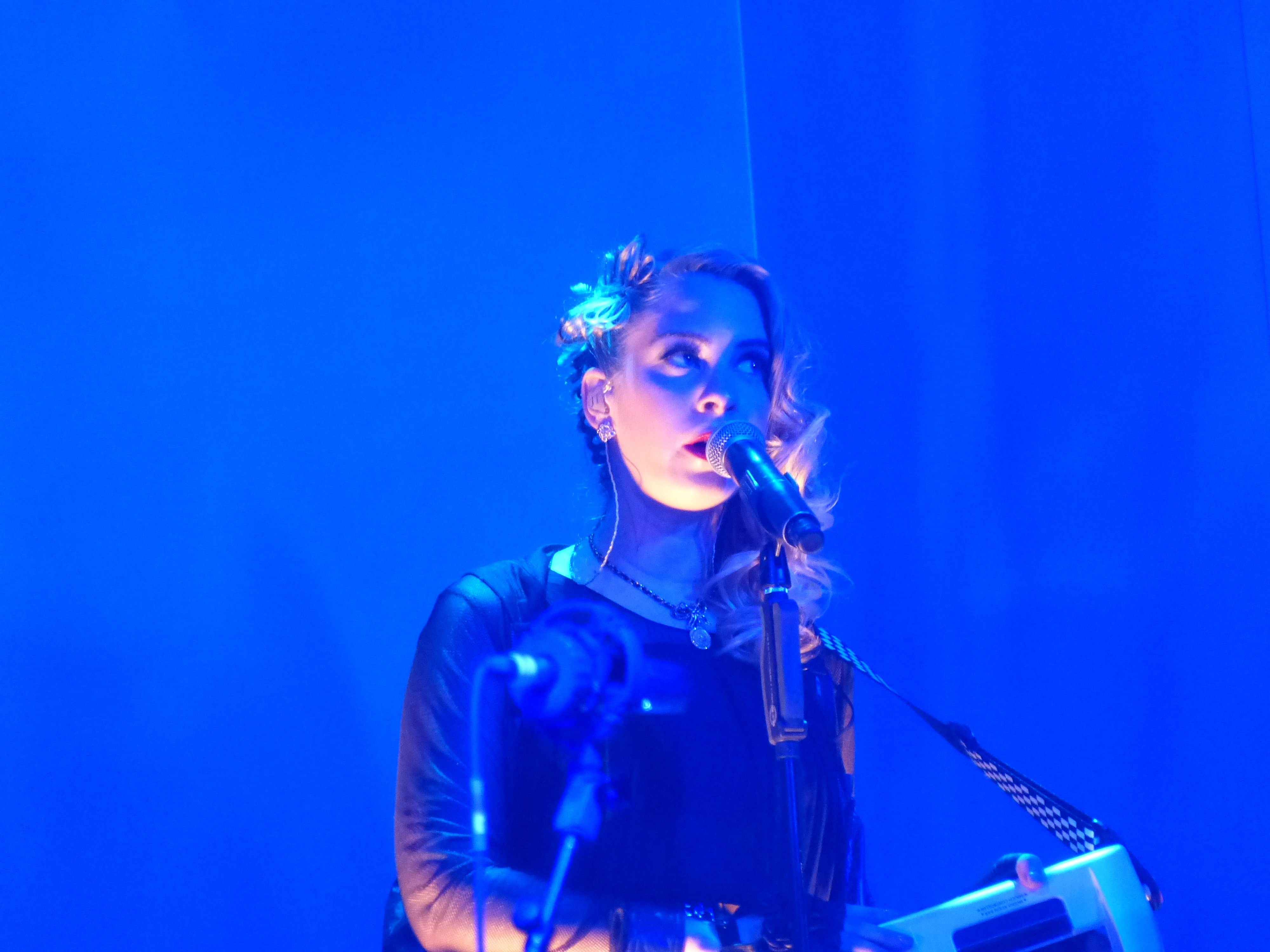 Jasmin Tawil singt beim Adel Tawil Konzert, am 01.04.2014 in der Lanxess Arena Köln - Debütalbum "Lieder"